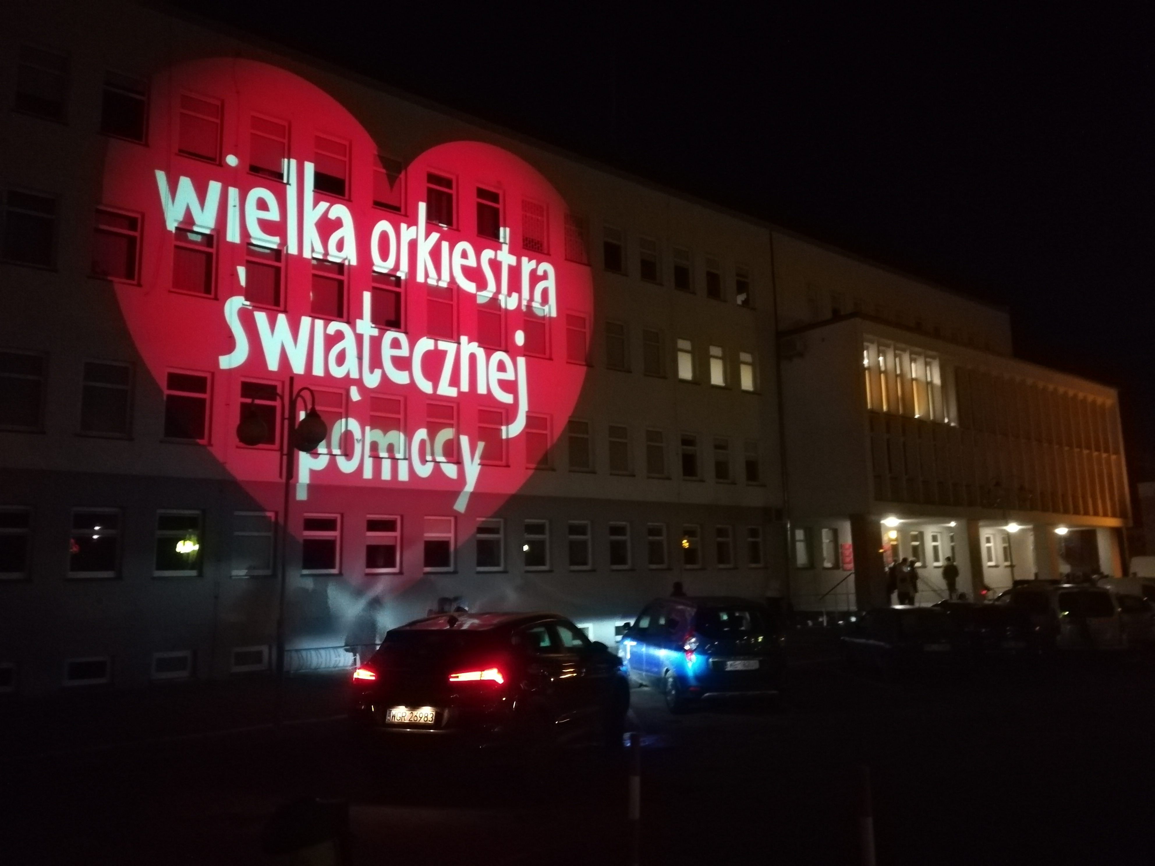 Starostwo powiatowe w Kole podświetlone motywem WOŚP